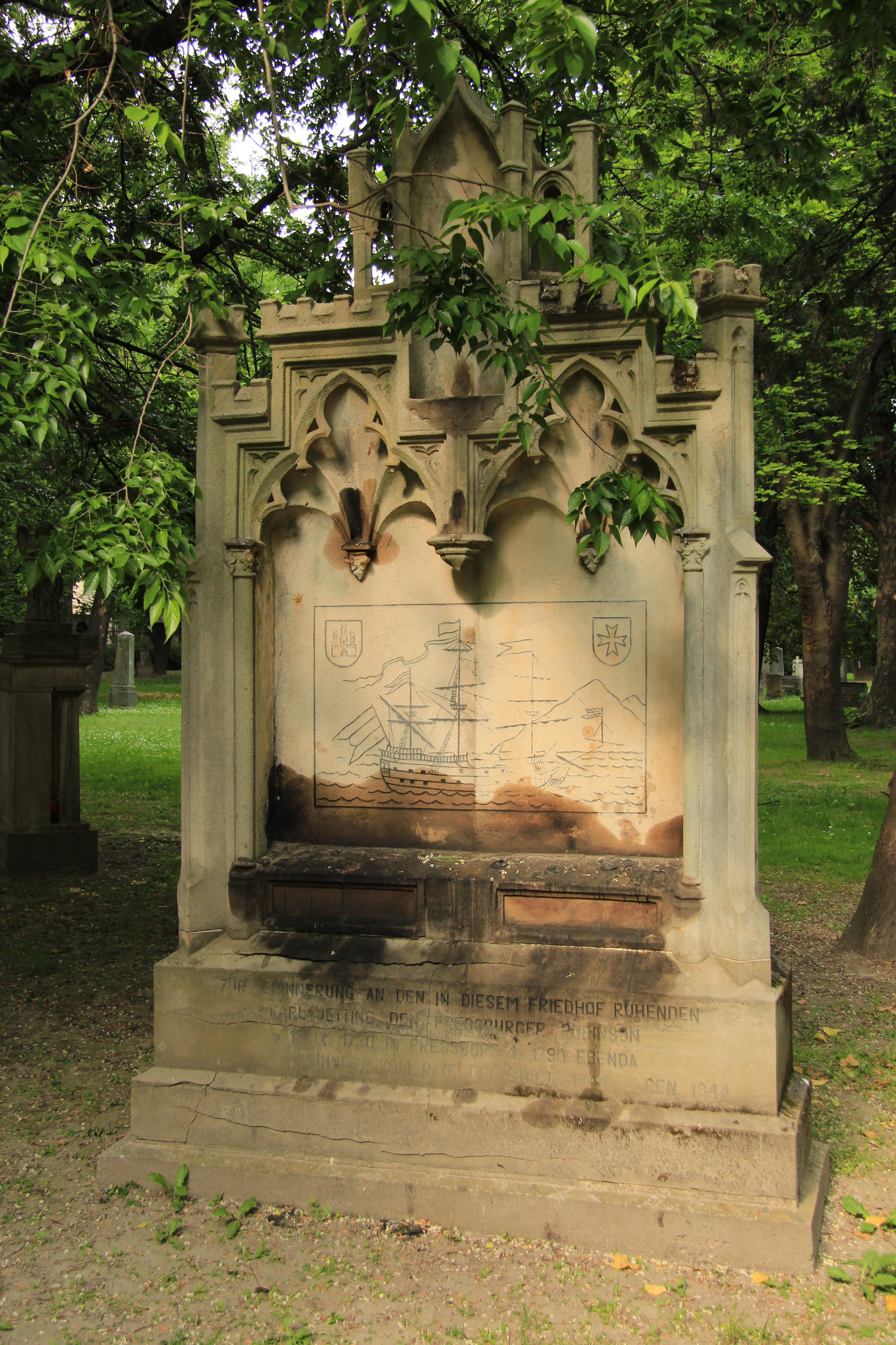 hrob s náhrobníkom+Jetting Karol; 1730-1790, diplomat